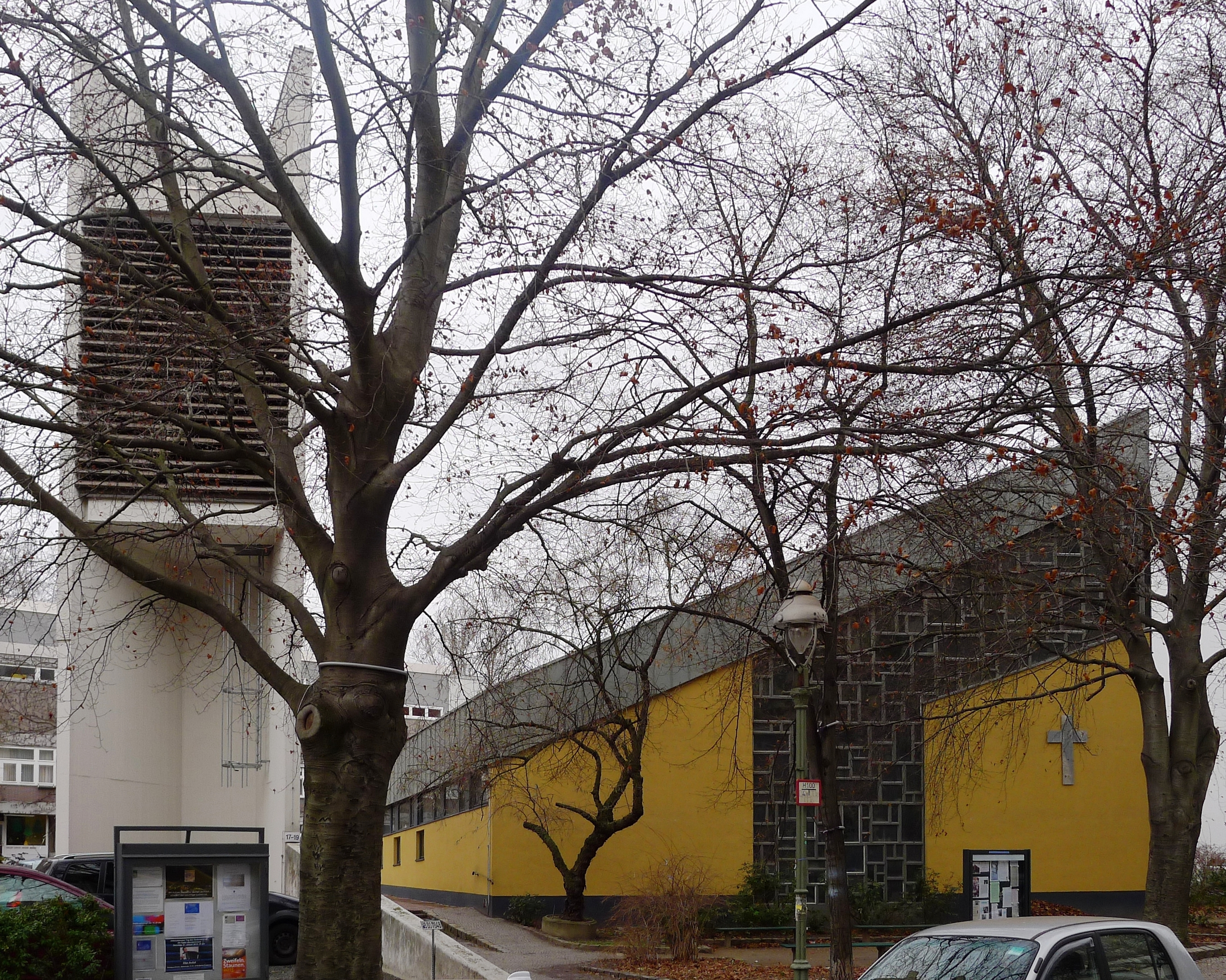 Die Philippus-Kirche von der Stierstraße aus gesehen.